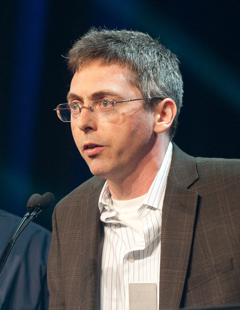 TT3_1381